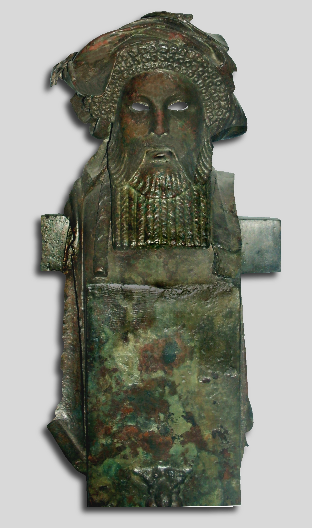 Tunisie, Fouilles sous marine de Mahdia